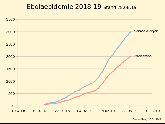 Ebolaepidemie seit 2018; Grafik der Fallzahlen (Erkrankungen und Todesfälle), Quellen: SITUATION ÉPIDÉMIOLOGIQUE DANS LES PROVINCES DU NORD-KIVU ET DE L'ITURI, Dr. Oly Ilunga Kalenga, Ministre de la Santé